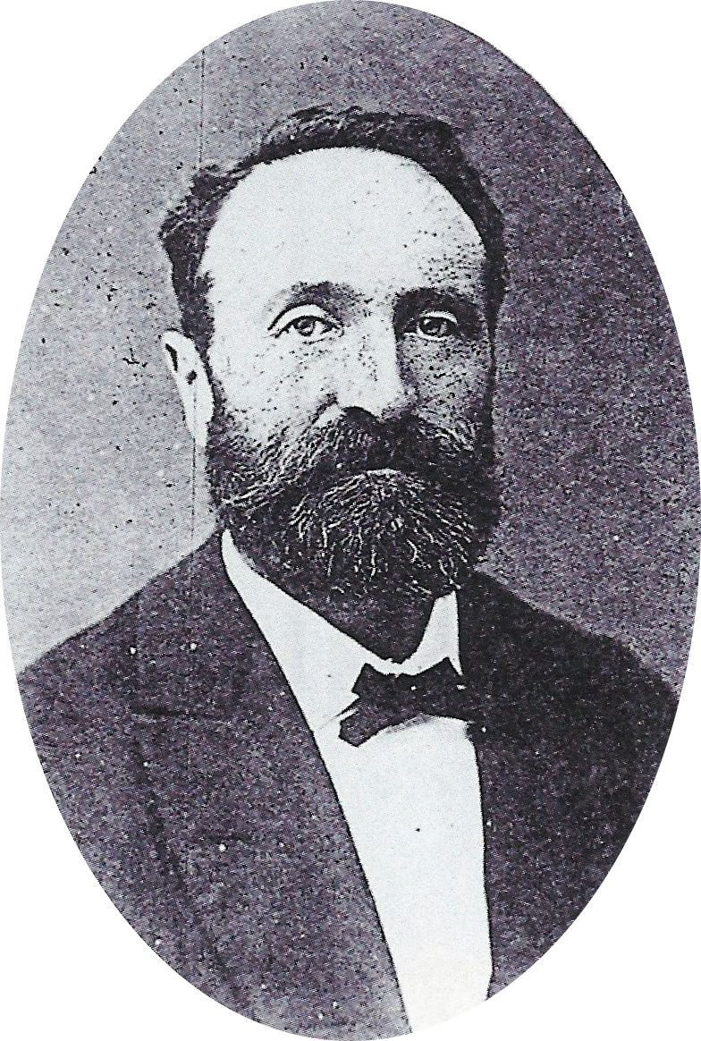 Porträt Ernest Lyé Baltet (1835-1922)